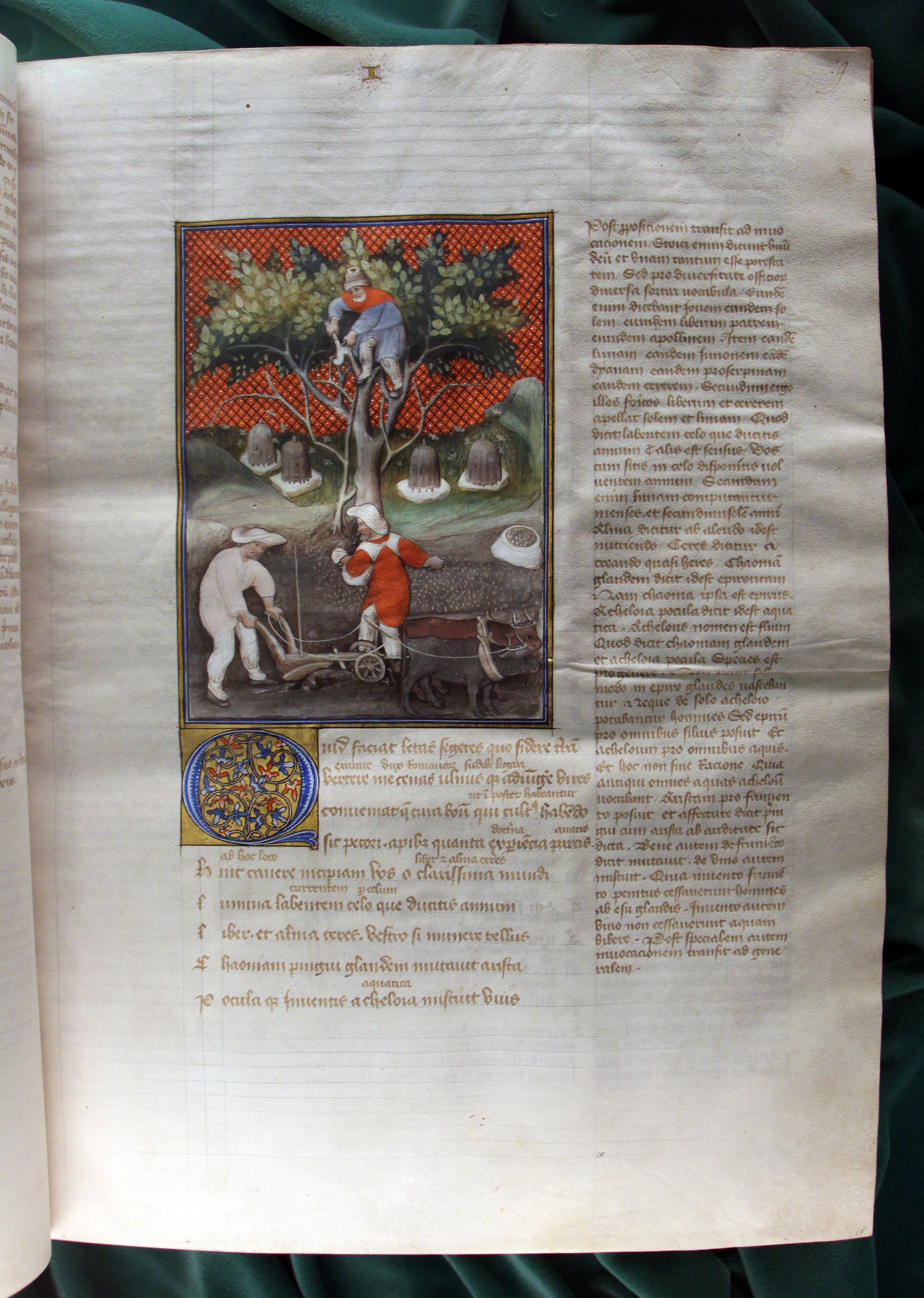 Biblioteca Medicea Laurenziana